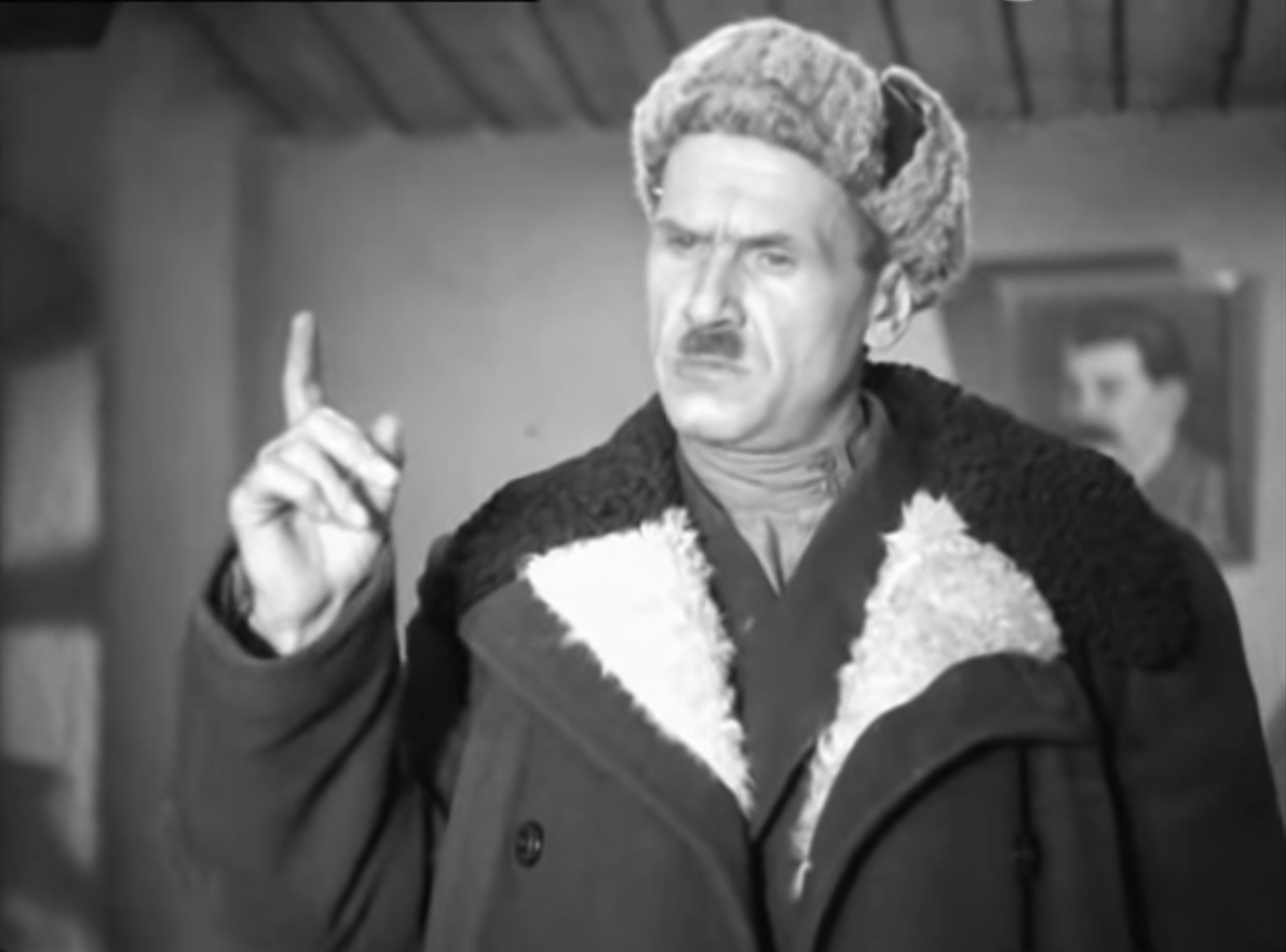 Борис Бабочкин в роли председателя колхоза Ивана Выборнова в фильме «Родные поля»